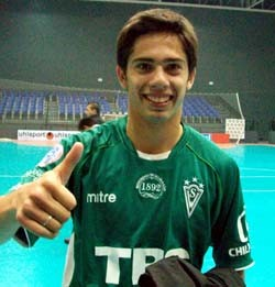 Fotografía de Héctor Núñez, jugador juvenil que alterna en el primer equipo de Santiago Wanderers de la Primera División de Chile. La fotografía fue tomada en el partido de futsal de su equipo contra Cobresal.